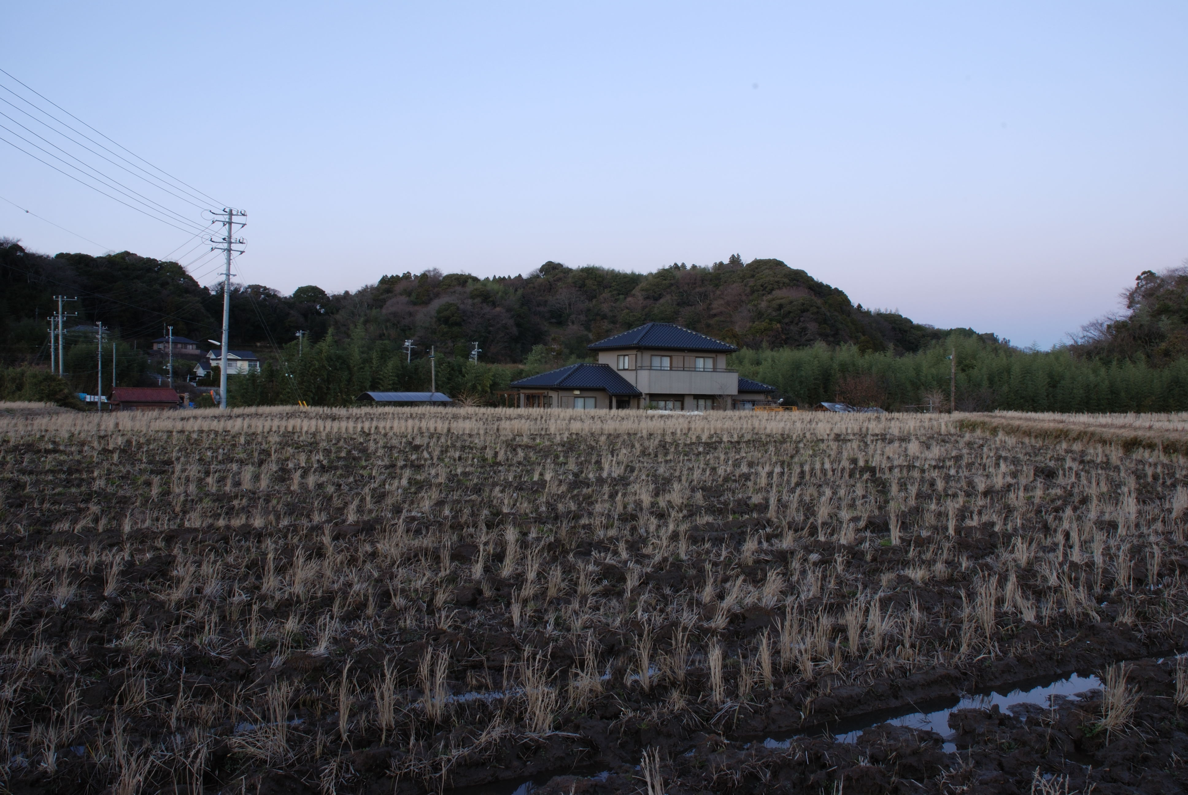 Sanuki Castle